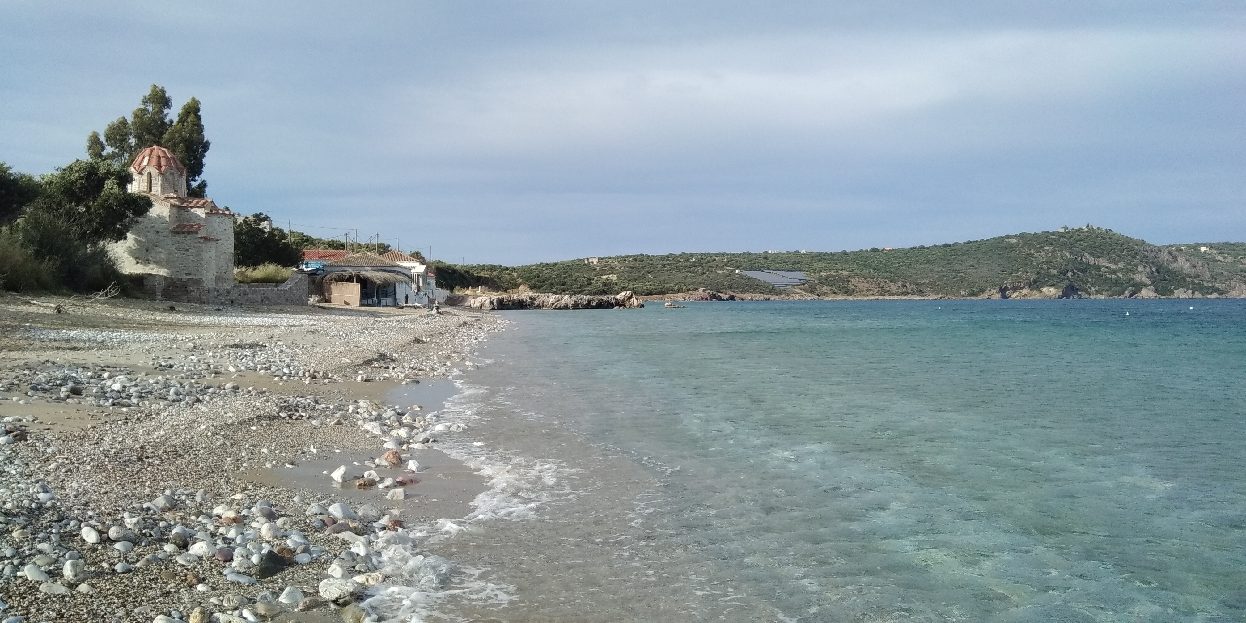 Aghia Varvara - coté sud - baie de Skoutari